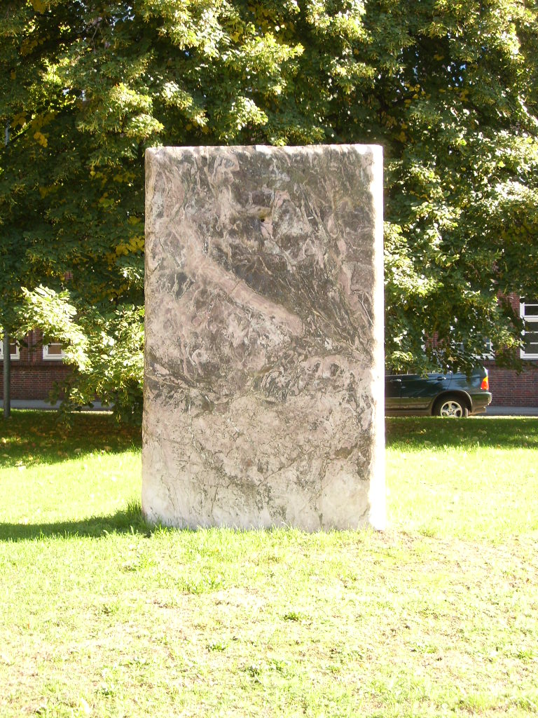 Skulptur Arabella (1983) des tschechischen Bildhauers Jan Koblasa in der öffentlichen Grünanlage des Kirchhofs des Lübecker Doms